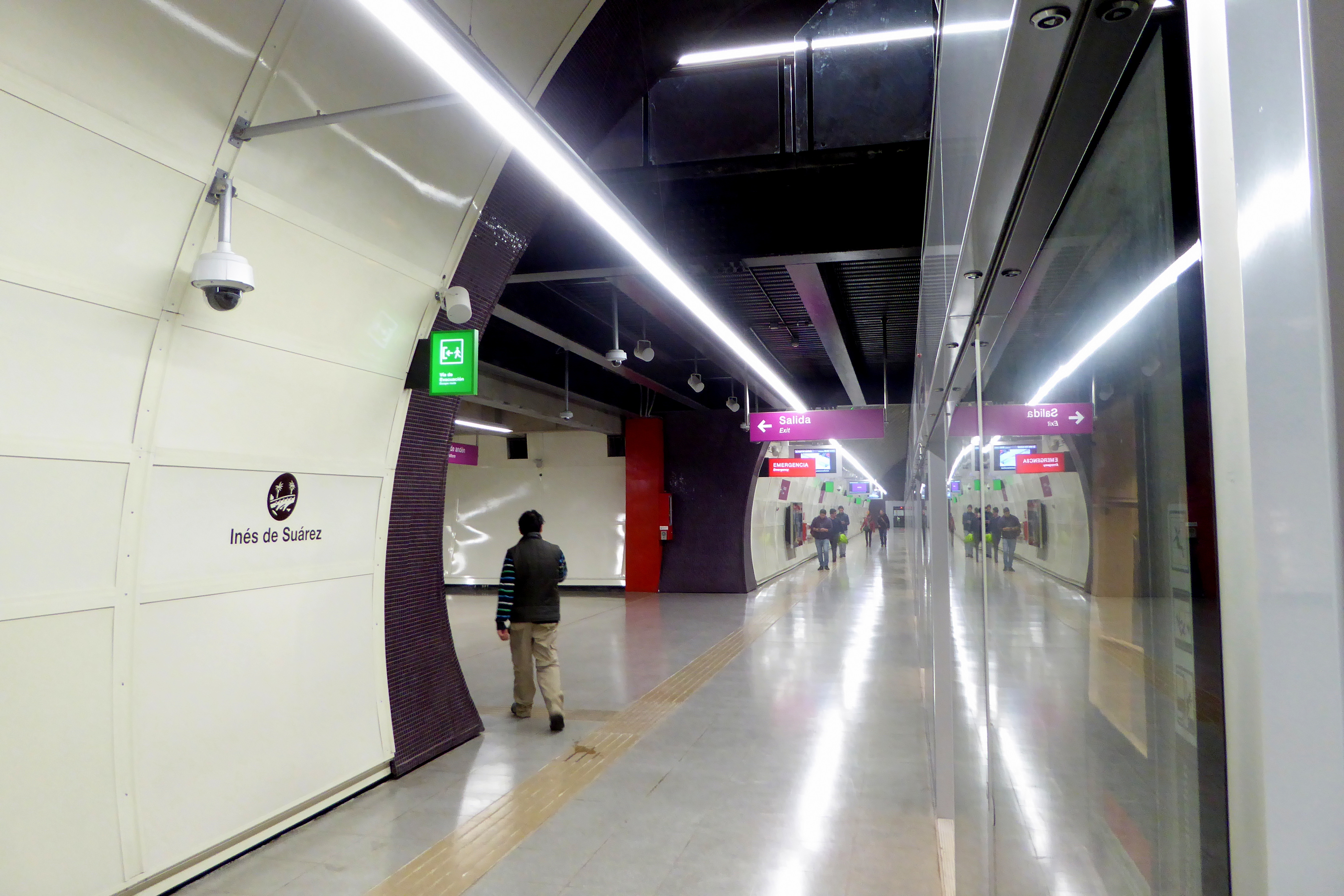 Vista del andén dirección Los Leones en Ñuble, Línea 6 del Metro de Santiago.